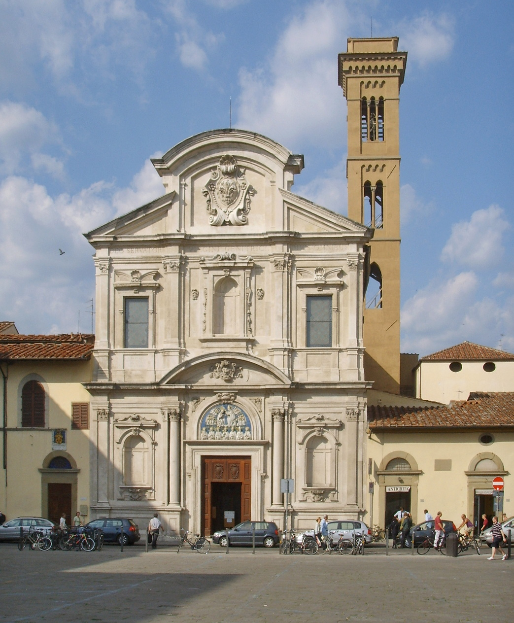 Chiesa di ognissanti, facciata